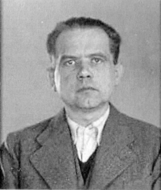 Otakar Schiedeck (* 11. června 1902 v Moravské Ostravě - 8. února 1943 v Berlíně ve věznici Plötzensee) byl magistr farmacie, který pracoval jako nenápadný lékárník v dejvické lékárně Zdeny Rybářové ve Velvarské ulici. Za protektorátu vedl malou odbojovou skupin složenou z dejvických skautů. Kromě toto dodával zpravodajsko-sabotážní skupině Tři králové jedy a léky. Pro ilegální odbojovou organizaci Obrana národa vykonával též funkci spojky. Jeho osoba je spojena s osudovou dejvickou schůzkou podplukovníka Josefa Balabána s "majorem Ondráčkem" dne 22. dubna 1941 večer. Tato schůzka se ukázala léčkou, při níž byl podplukovník Josef Balabán zatčen gestapem. Otakar Schiedeck byl zajat druhý den (23. dubna 1941) ve svém bytě. Po téměř dva roky trvajícím věznění byl Otakar Schiedeck v Berlíně popraven gilotinou. Vazební fotografie z roku 1941.